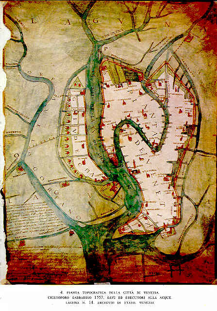 The author is Cristoforo Sabbadino (or Sabatino) 1557. Picture taken and assembled by me.